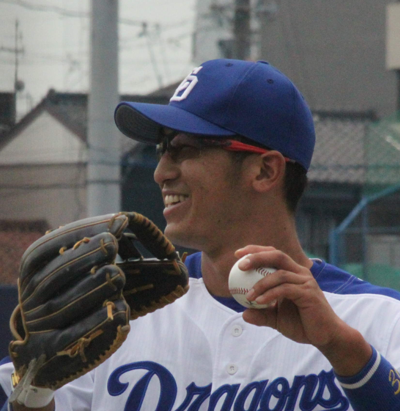 2017年9月20日、ナゴヤ球場にて